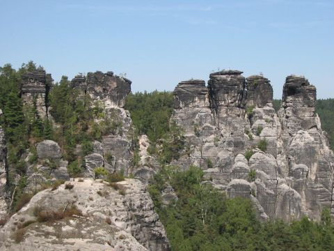 Felsformation "Kleine Gans" (Vorderer, Mittlerer und Hinterer Gansfels sowie Plattenstein (v.r.n.l.) in der Sächsischen Schweiz, im Gebiet von Rathen.Blick von der Bastei nach Norden. Die Originalaufnahme hat eine Auflösung von 1024*786 Punkten, sie ist beim Fotografen erhältlich.